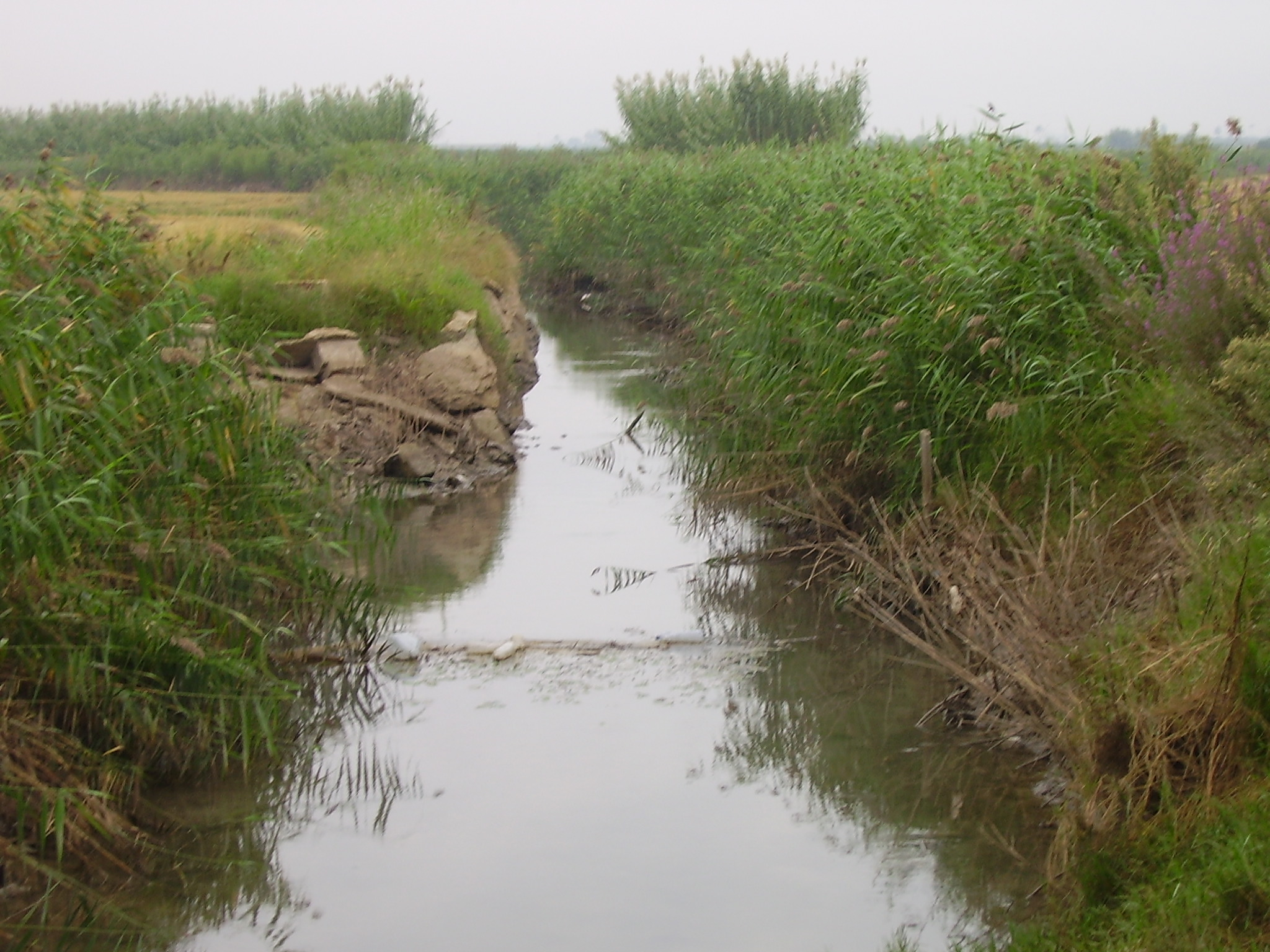 Marjal de Algemesí